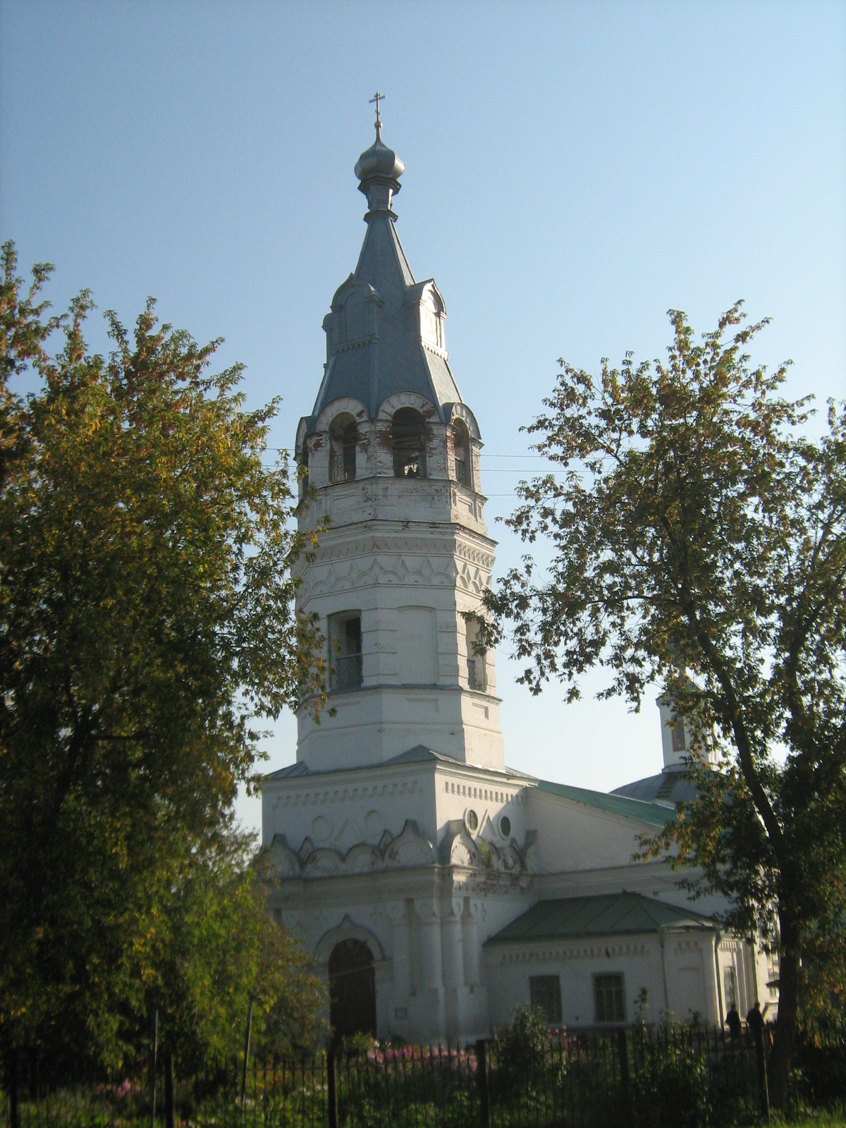 колокольня над входом в храм, 2009 г.